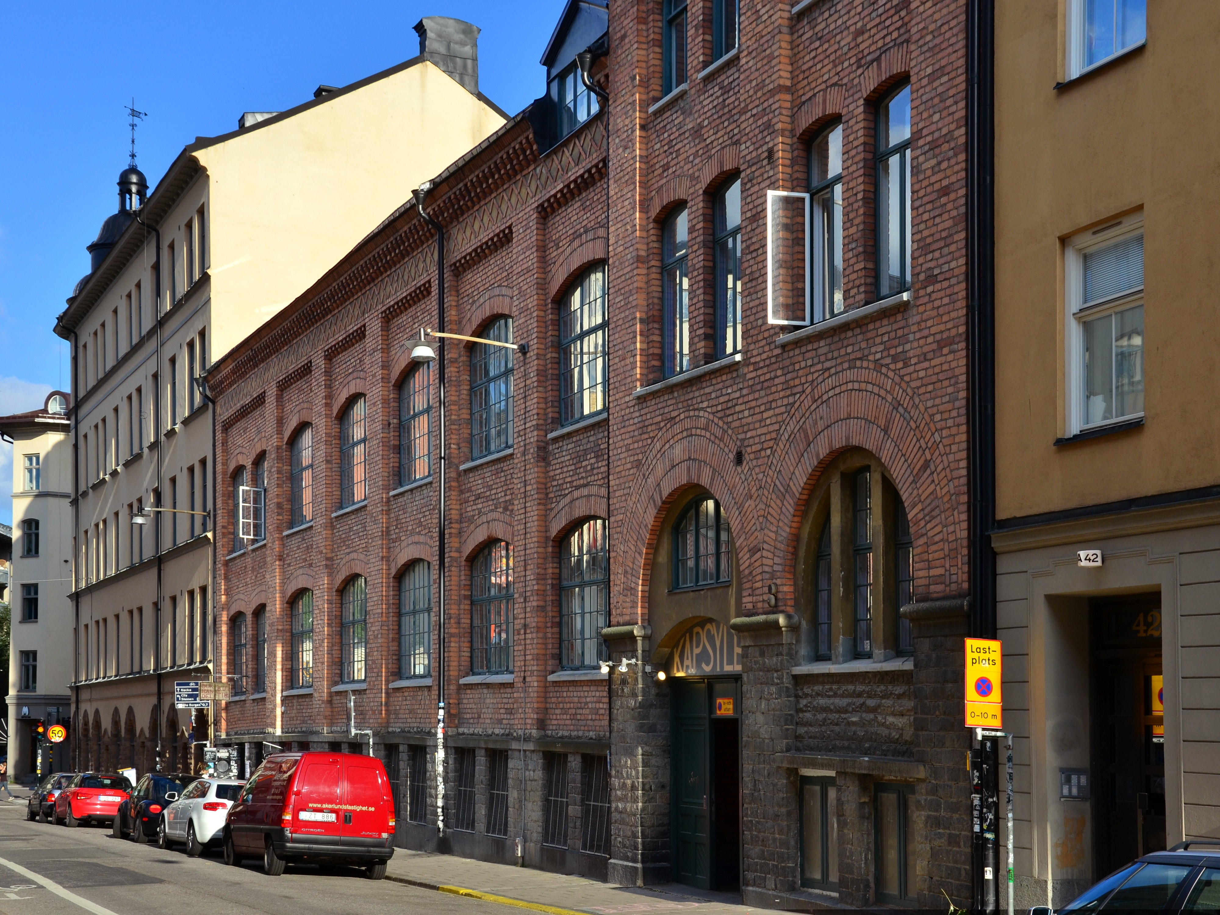 Arbetskollektivet Kapsylen på Södermalm, Stockholm.